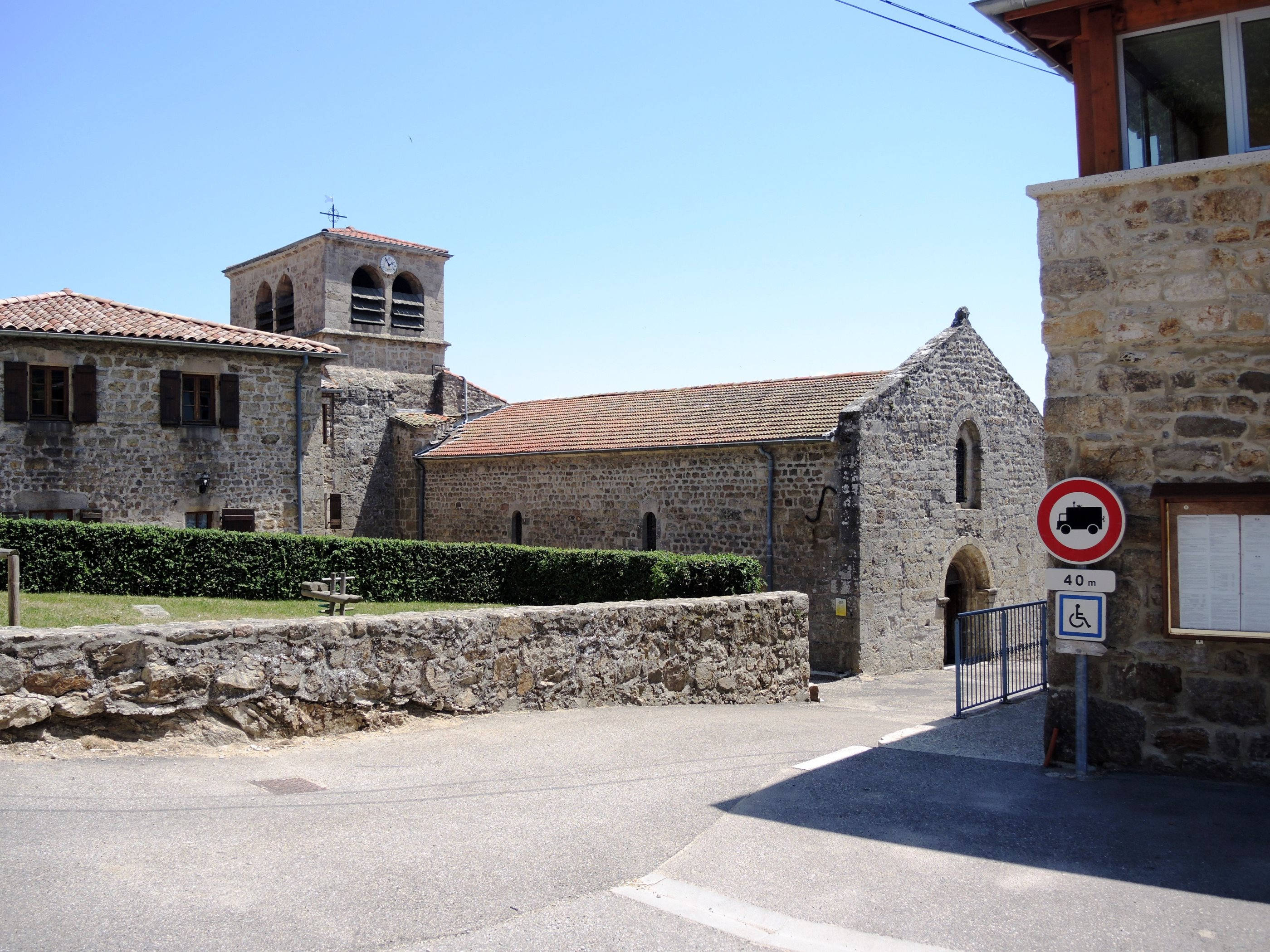 St-Symphorien de Mahun église